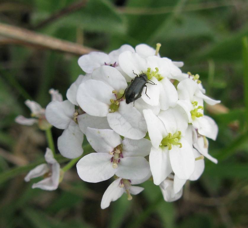 Соцветие Стевении левкойной (Stevenia cheiranthoides).Каменистая степь в окрестностях г. Красноярска.